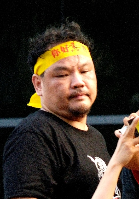 中文（台灣）: 學者管中祥